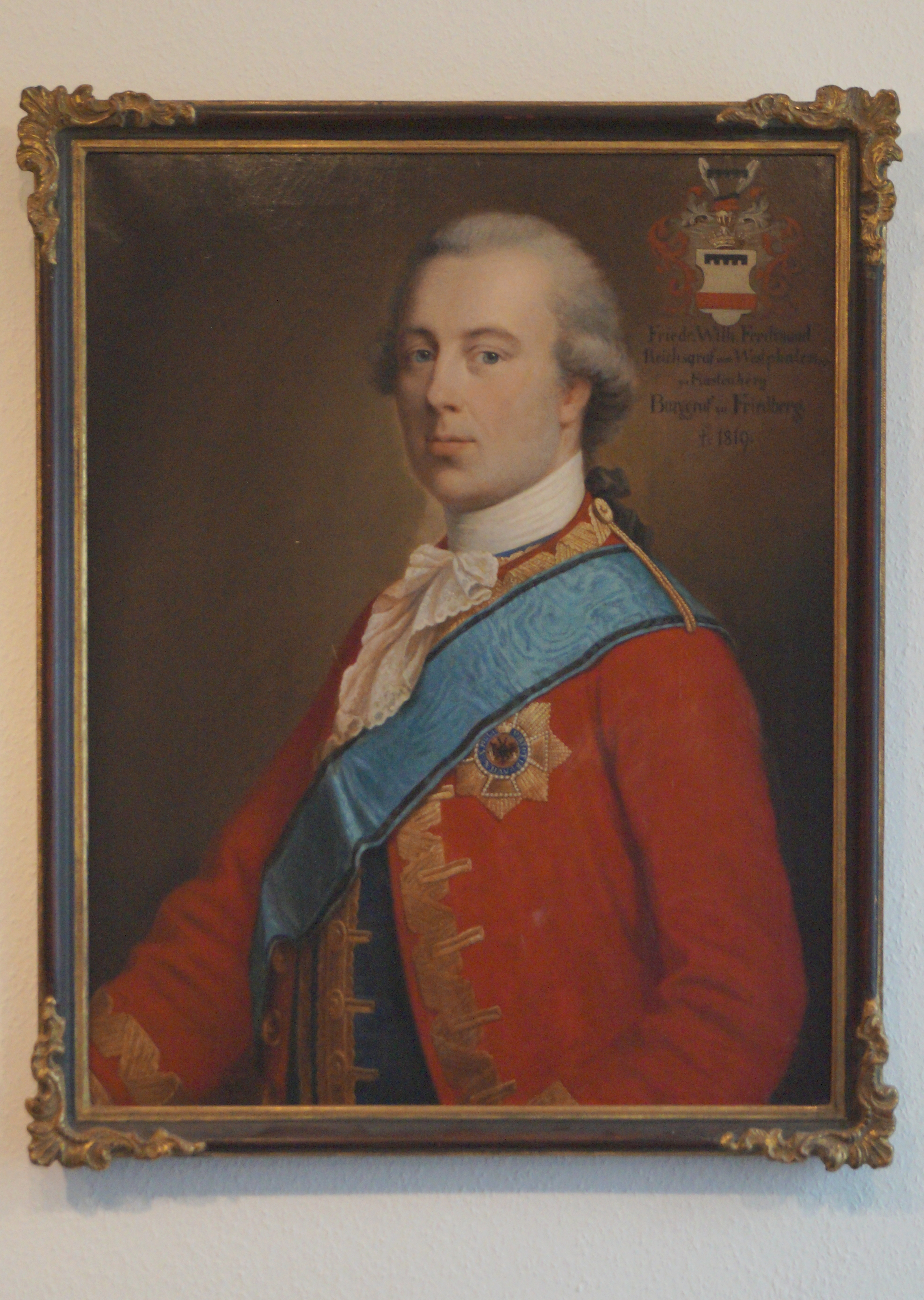 Portraits Friedberger Burggrafen im Wetterau-Museum. V. l. n. r.: Franz Heinrich von Dalberg, Johann Maria Rudolf Reichsgraf Waldbott von und zu Bassenheim, Clemens August von Westphalen. Mit freundlicher Genehmigung des Museums.